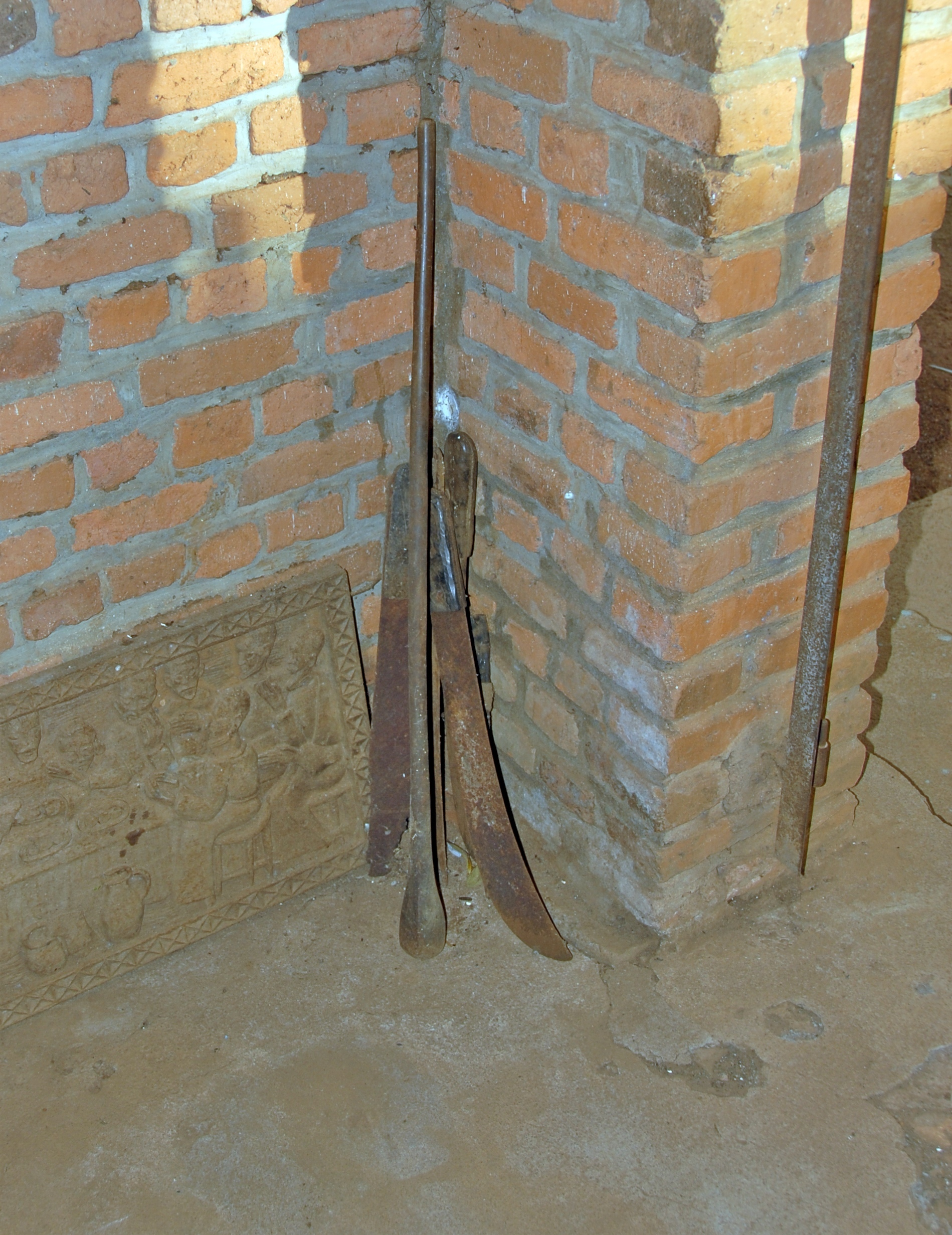 Ntarama Church Genocide Memorial